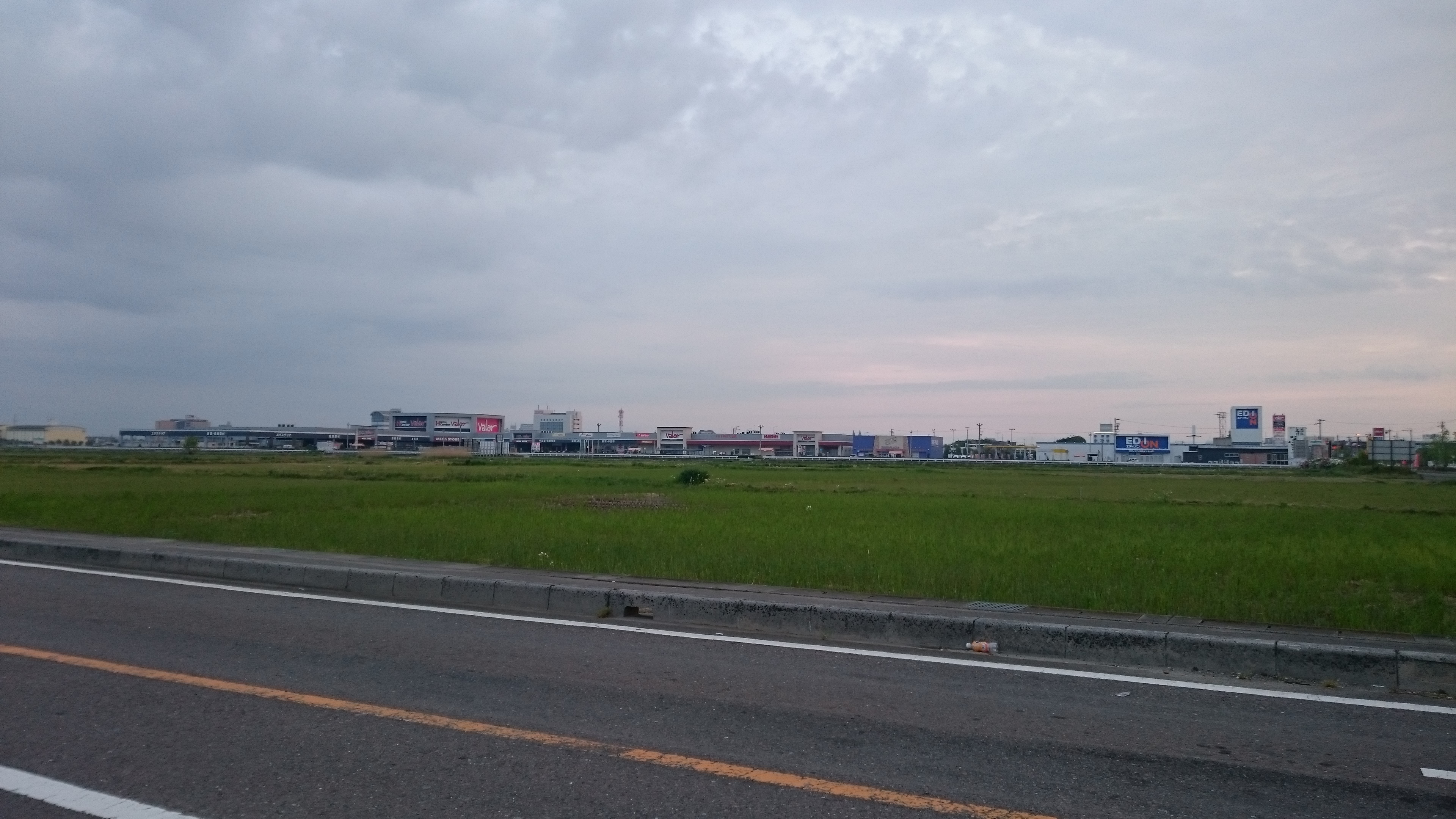 バロー羽島インター店を、南方から撮影